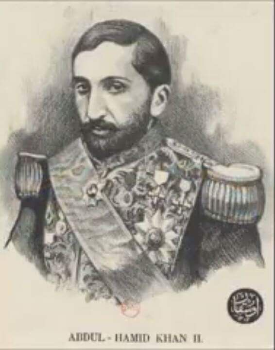 Abdülhamid II gençliği. Çizim.